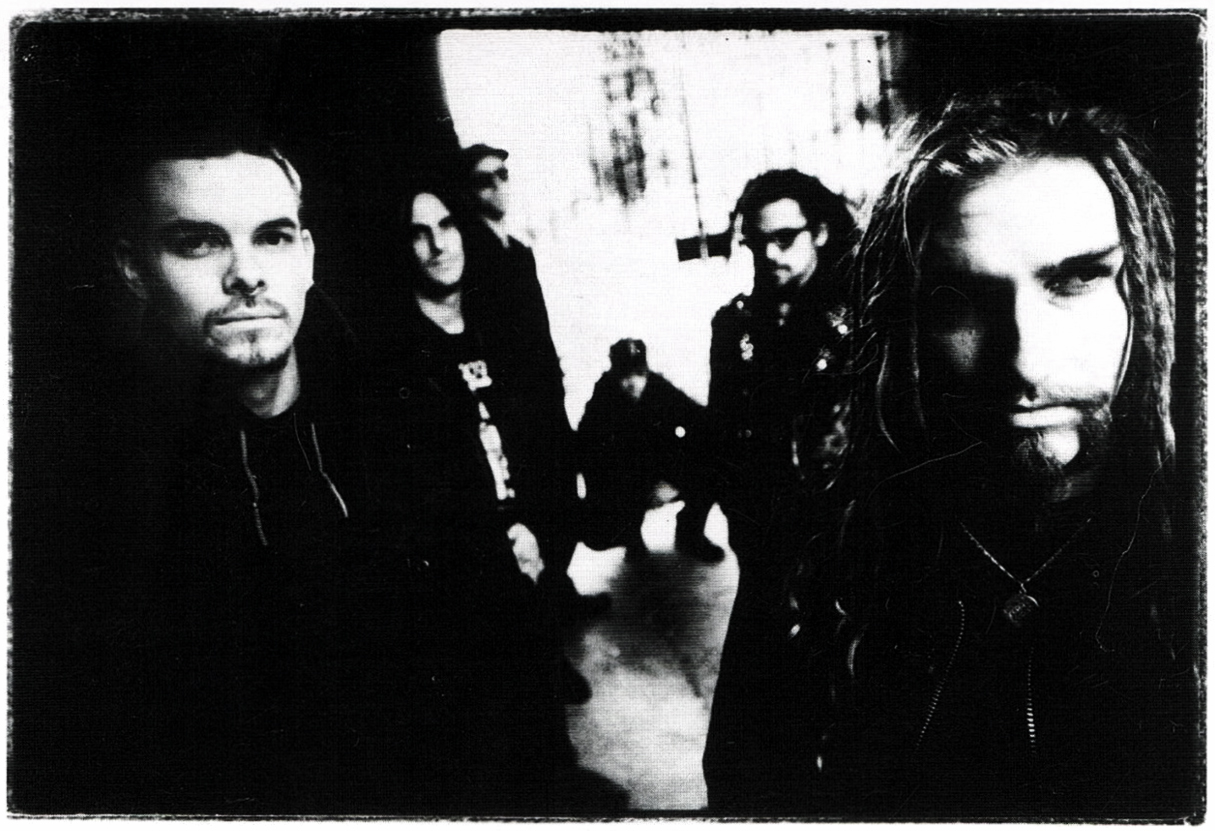 Photo promo du groupe Neurosis pour l'album "Souls At Zero", 1992